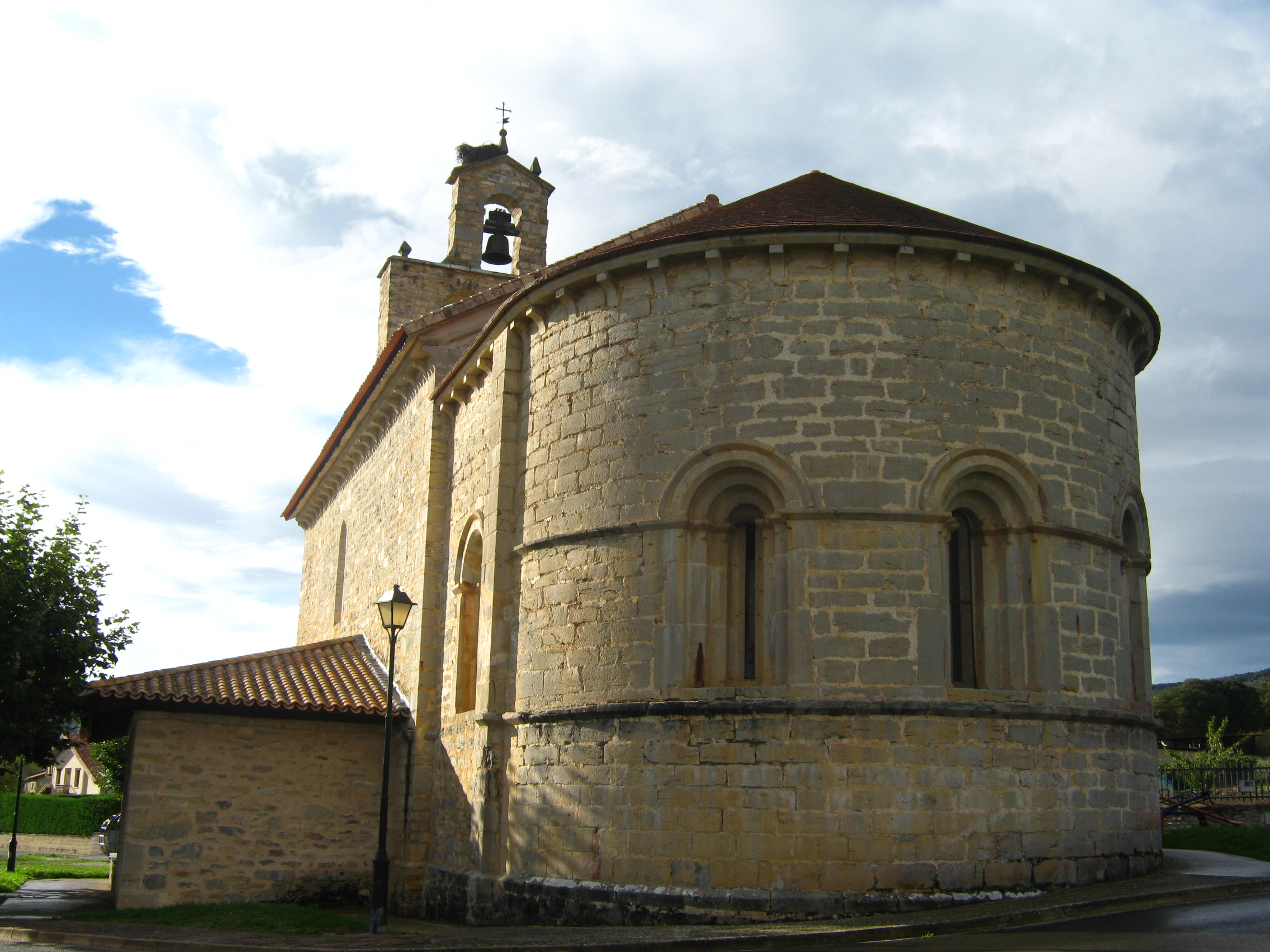 Iglesia de Hueto Arriba (Álava, España)